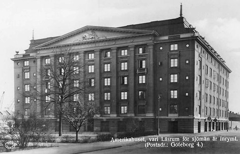 Amerikahuset i Göteborg, arkitekt Arvid Bjerke